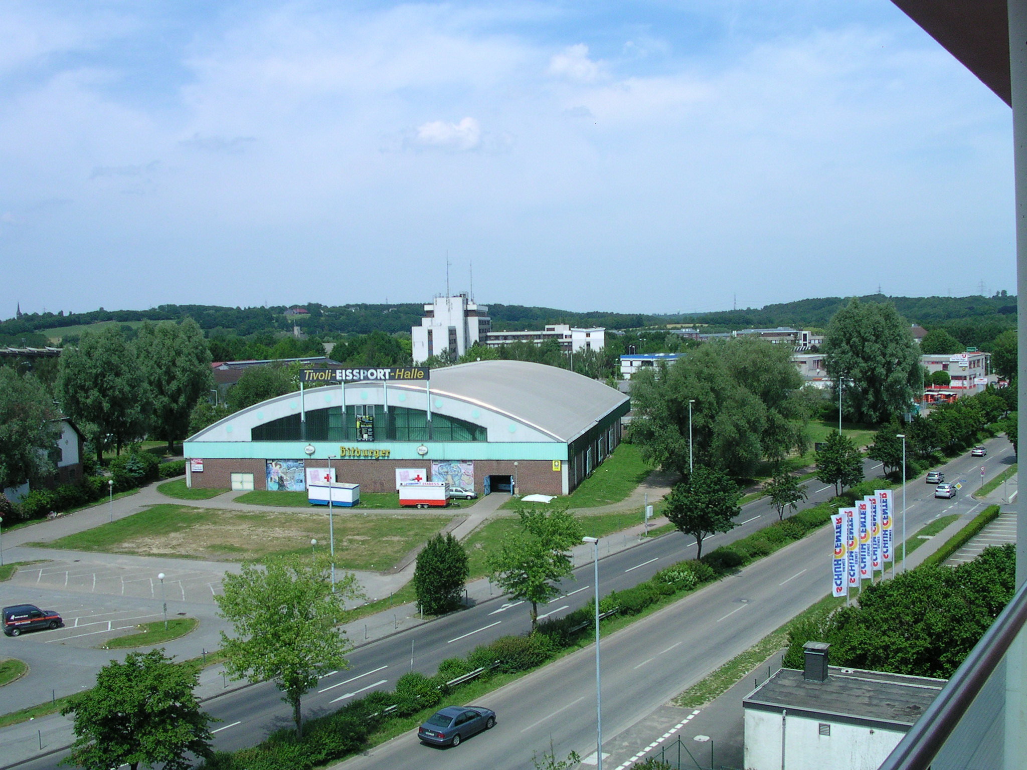 Aachen, Eissportzentrum, genau dahinter liegt das Polizeipräsidium. Fotografiert wurde dies aus dem Finanzamtszentrum bei Tag der Architektur NRW 2006